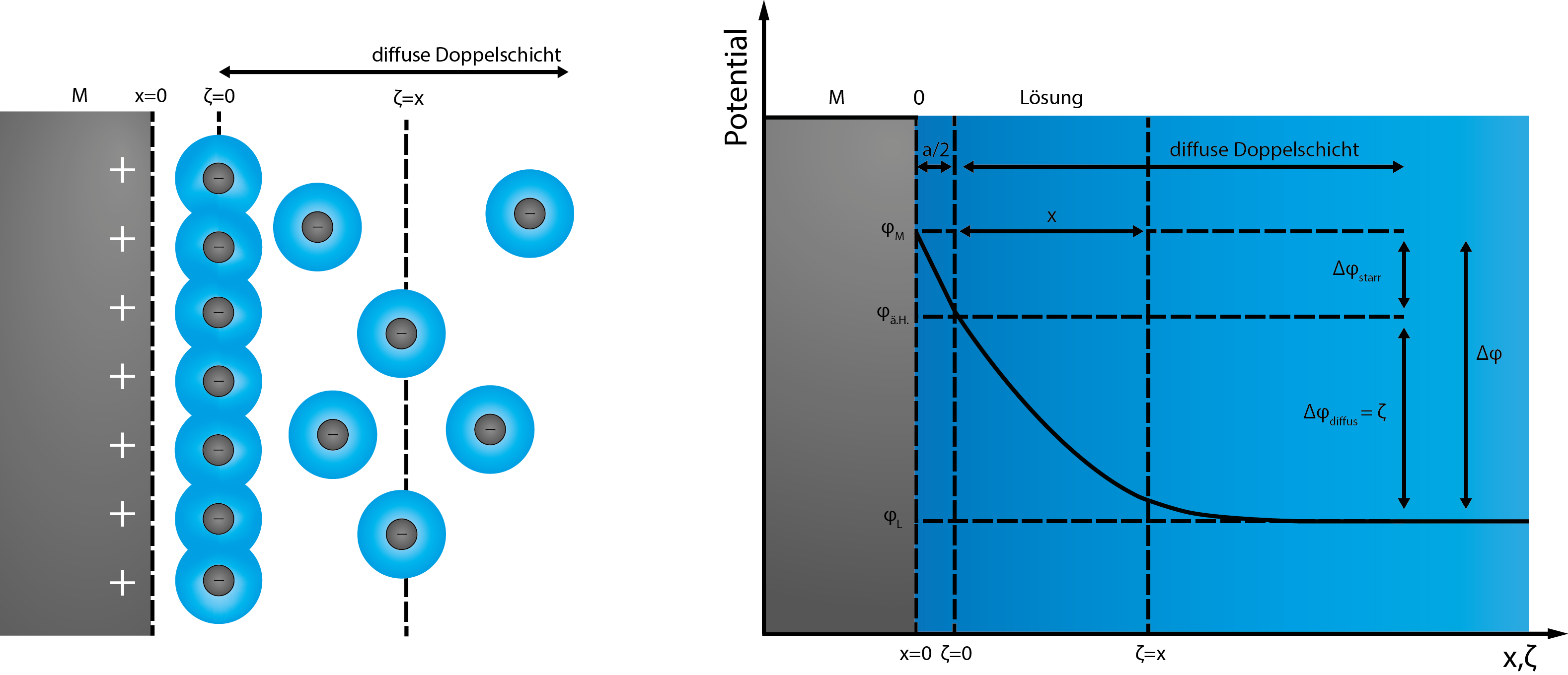 Das Stern-Modell der elektrochemische Doppelschicht. M = Elektrodenmetall, ä.H. = äußere Helmholtzfläche, a/2= Radius der solvatisierten Überschussionen, Δφ = Potentialunterschied zwischen Lösung und Metall, x = Abstand zur Elektrodenoberfläche, ζ = Ortskoordinate mit ζ = x - a/2. Linke Bildhälfte: Schema, das die Anordnung von Elektrode und Elektrolyt und eine Momentaufname einer Verteilung der Ionen im Elektrolyten veranschaulicht. Rechte Bildhälfte: Potentialverlauf nach dem Stern-Modell.